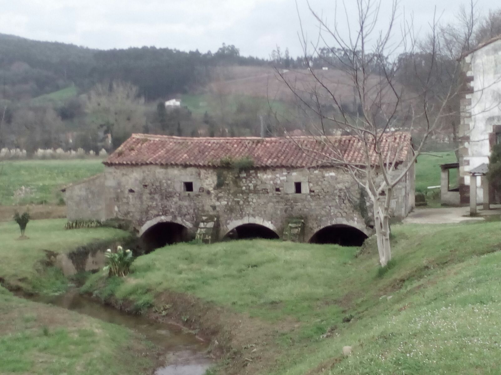 Molino harinero situado en la localidad española de Zurita (Piélagos, Cantabria).